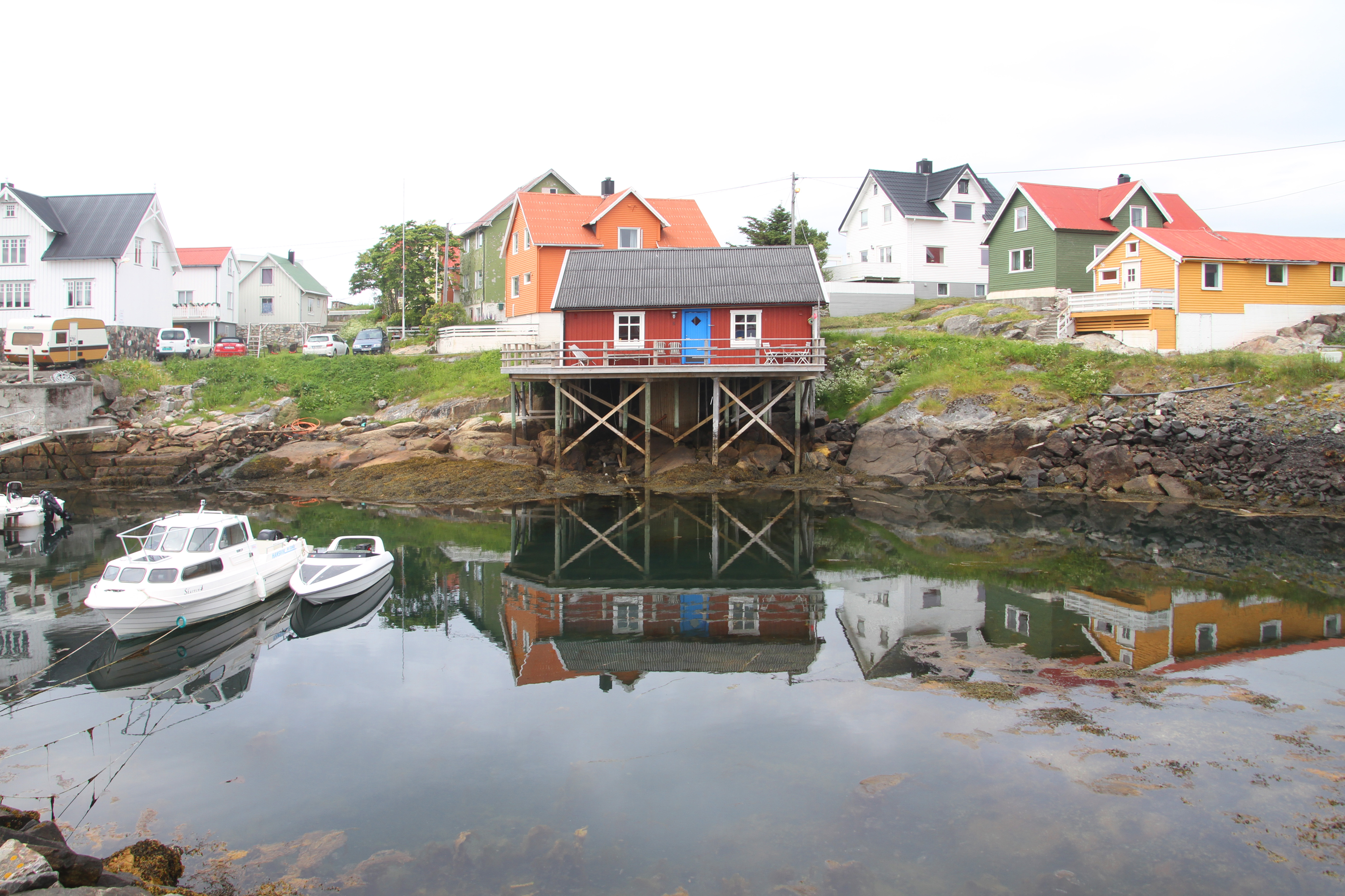 Henningsvær auf Austvågøy (Lofoten, Norwegen)